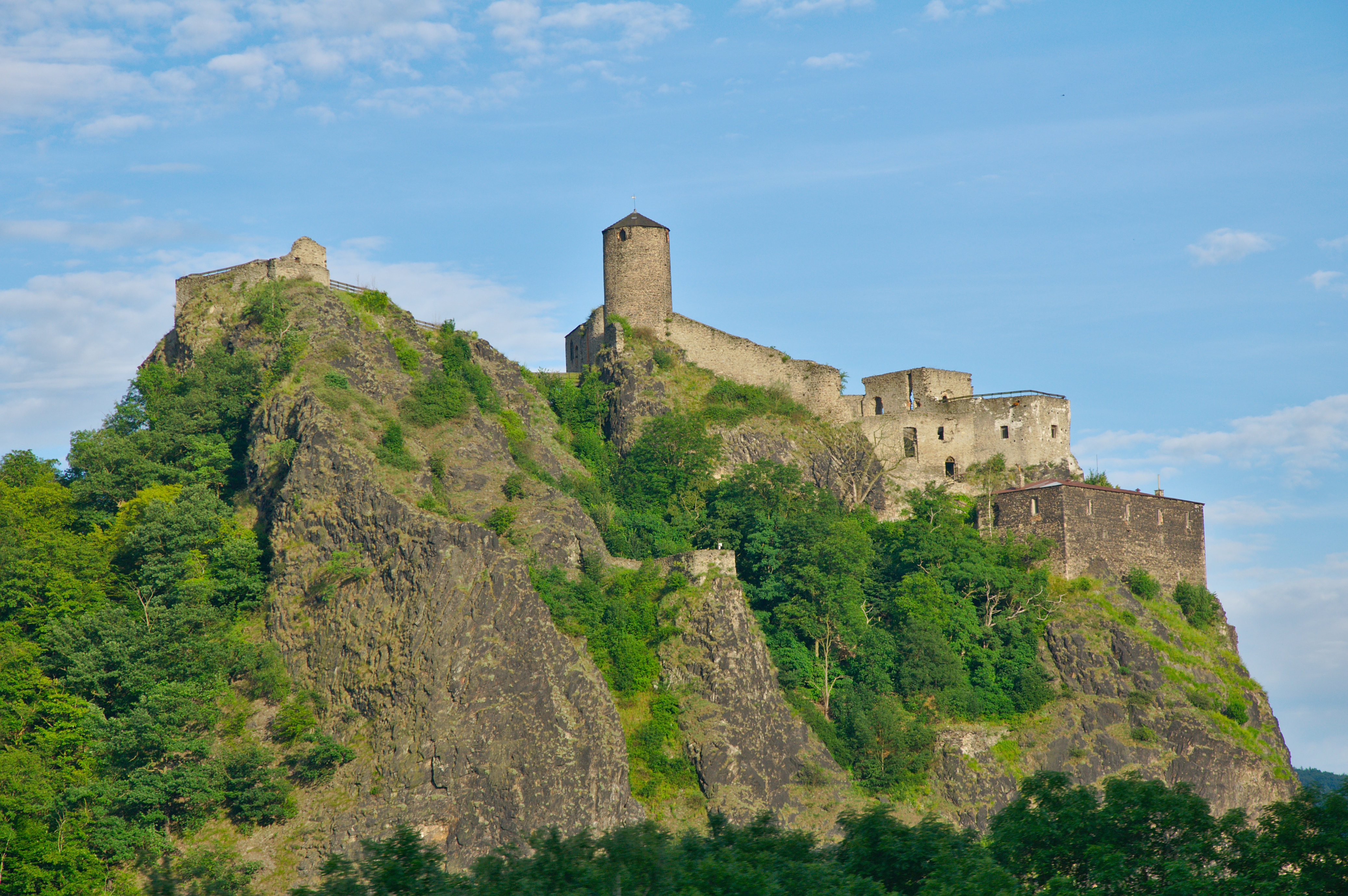 Hrad Střekov, Střekov, okres Ústí nad Labem